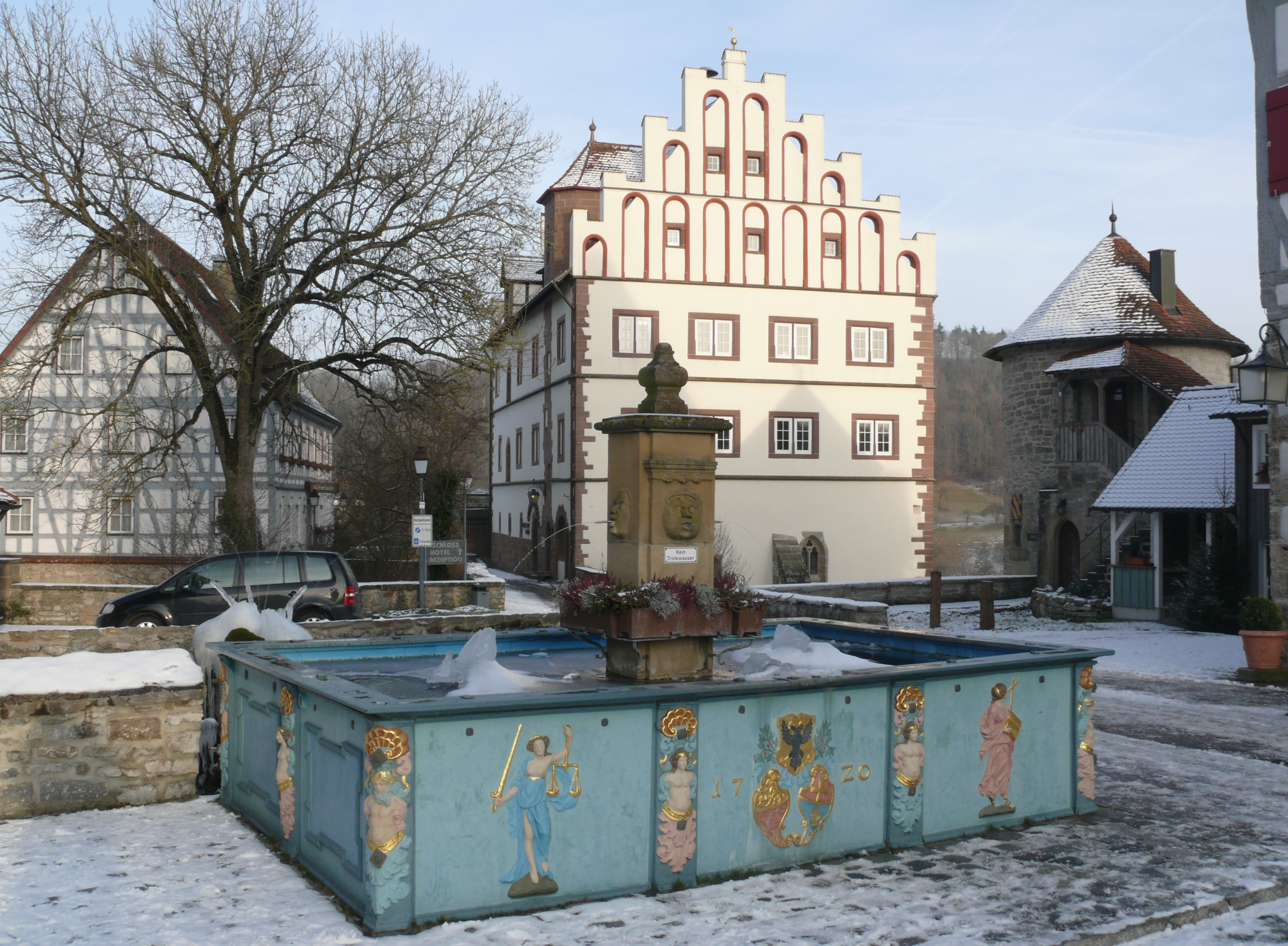 Brunnen und unteres Schloß, Velllberg, Germany